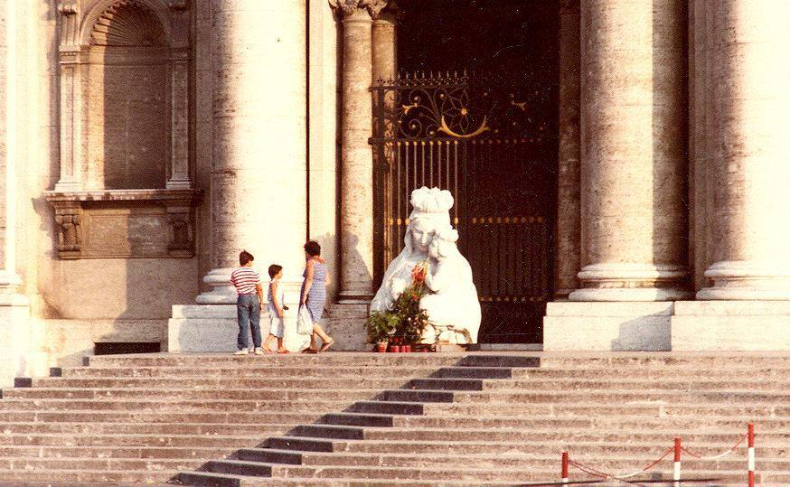 Napoli - Basilica dell'Incoronata Madre del Buon Consiglio. Statua della Madonna crollata a seguito del terremoto del 23 novembre 1980 dalla sommità della facciata. Autore della foto sconosciuto.